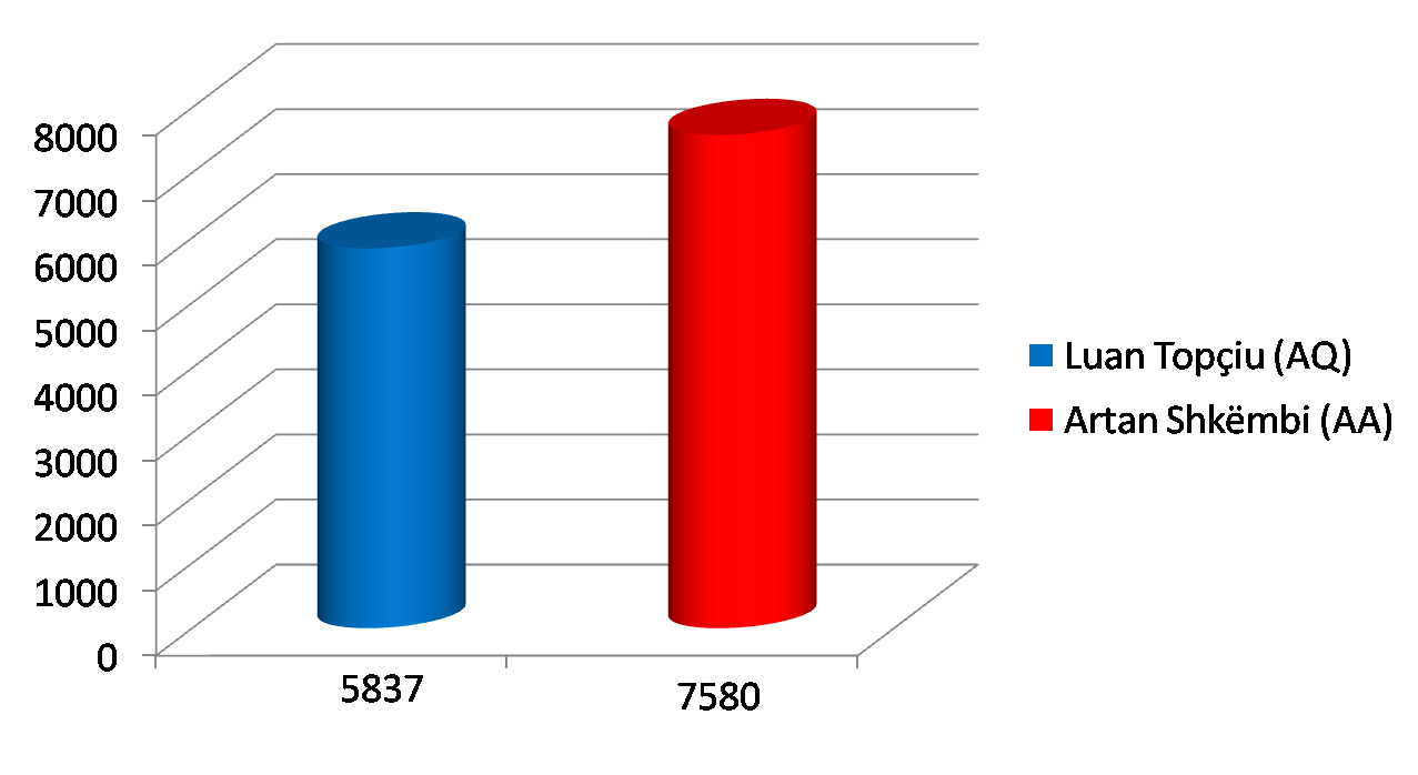 Rezultati në Pogradec